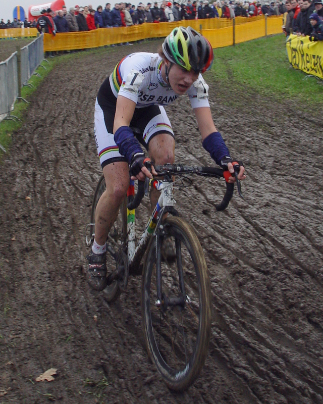 Marianne Vos in de veldrit van Hoogerheide op 21 jan 2007